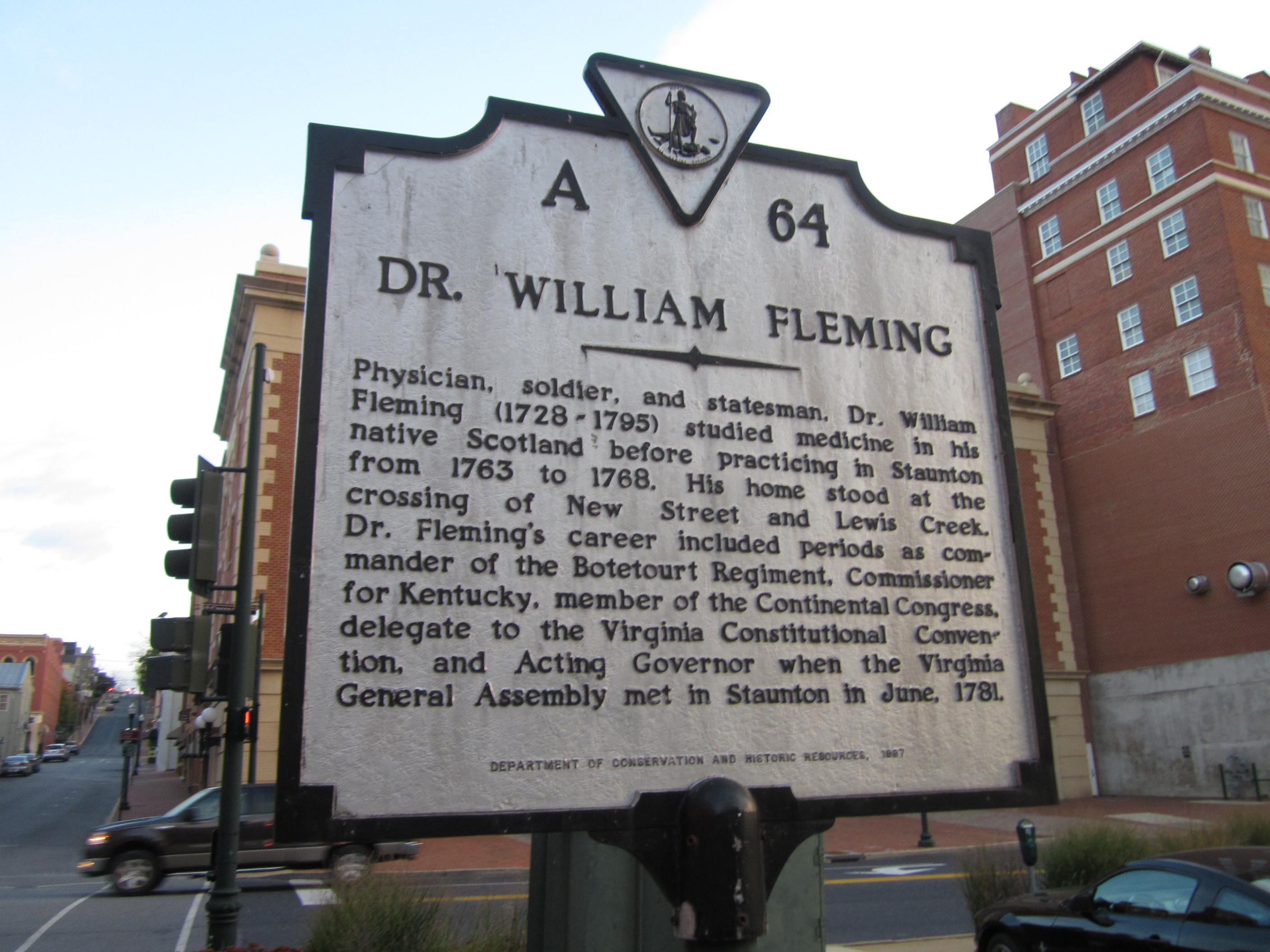 Staunton, Virginia